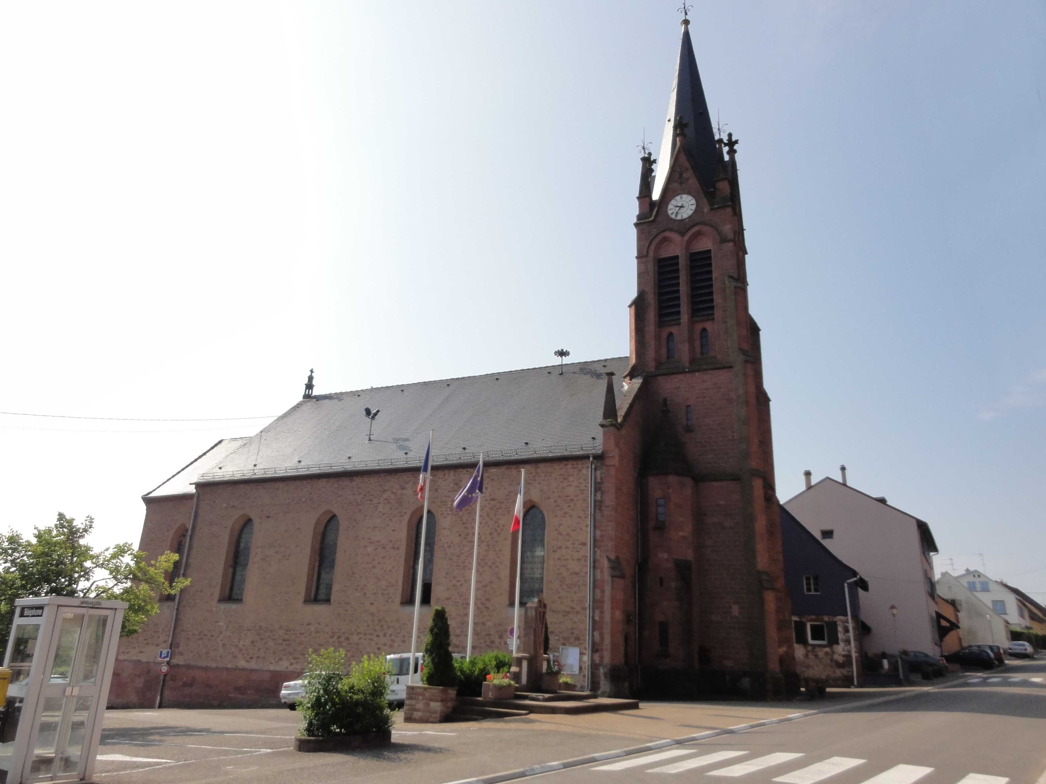 Alsace, Bas-Rhin, Reinhardsmunster, Église Saint-Léger (IA67007616)